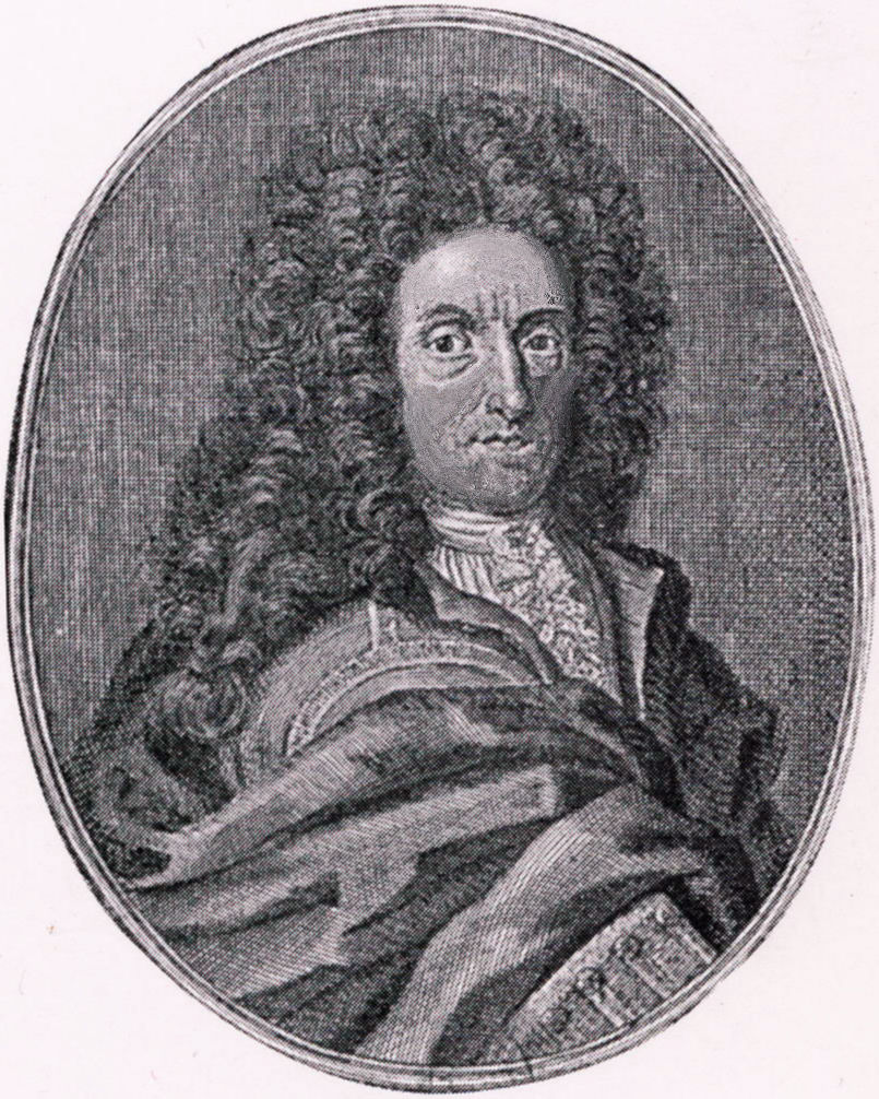 Portrait d'Henri Gautier